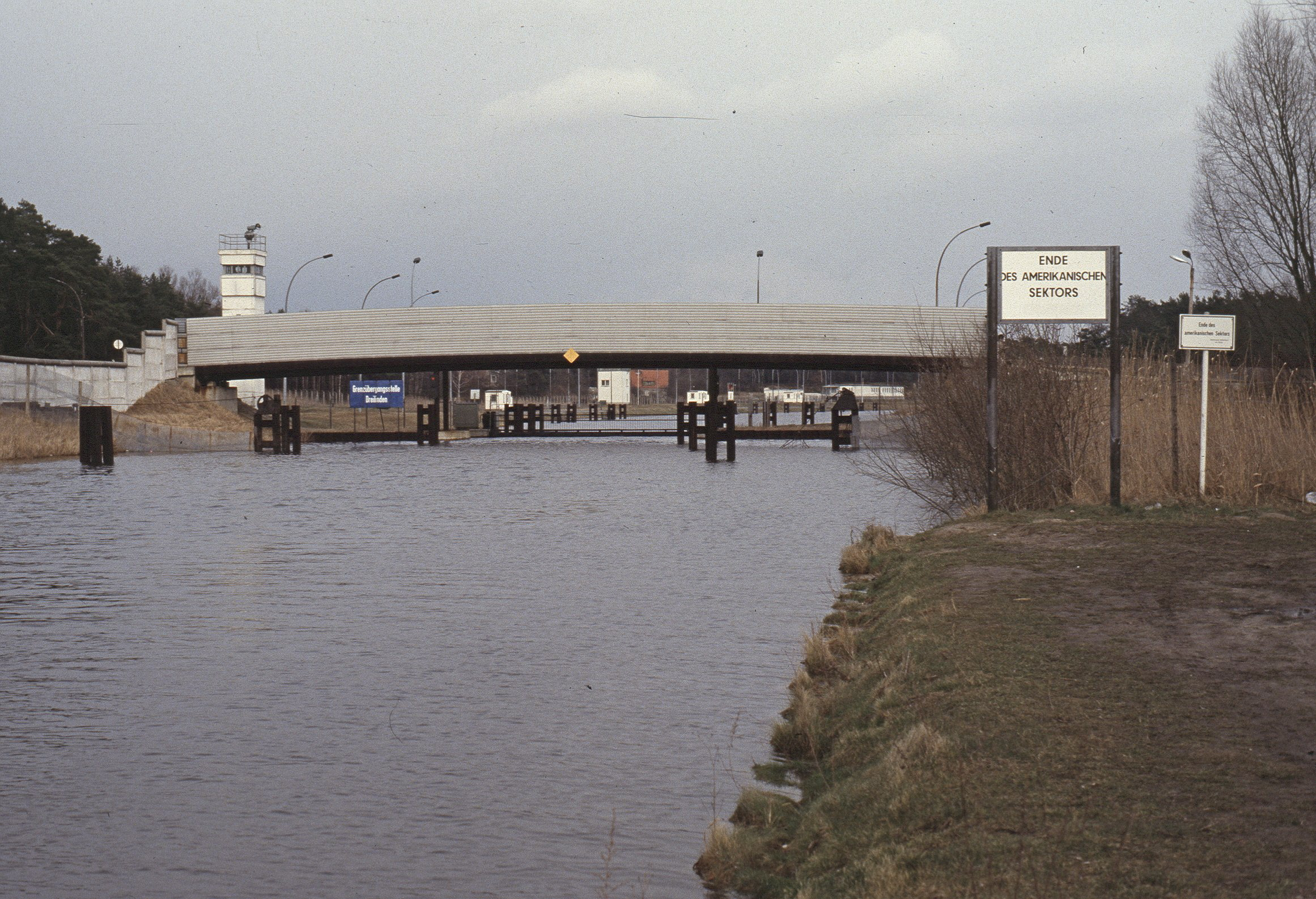 Teltowkanal bei Albrechts Teerofen mit Blick auf die Brücke des Postenwegs der DDR-Grenztruppen über den Kanal östlich der alten Autobahnbrücke.